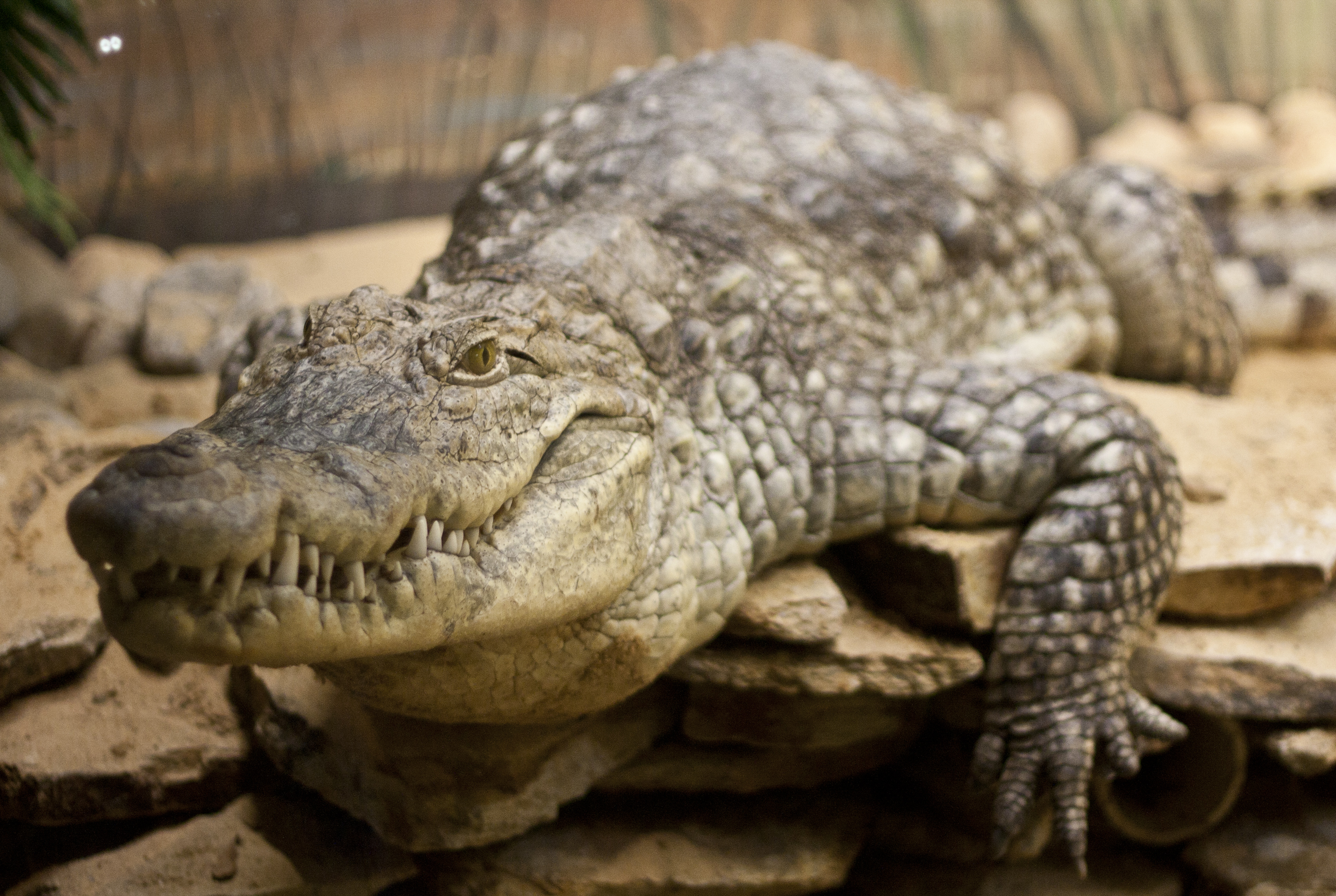 Crocodile du Nil